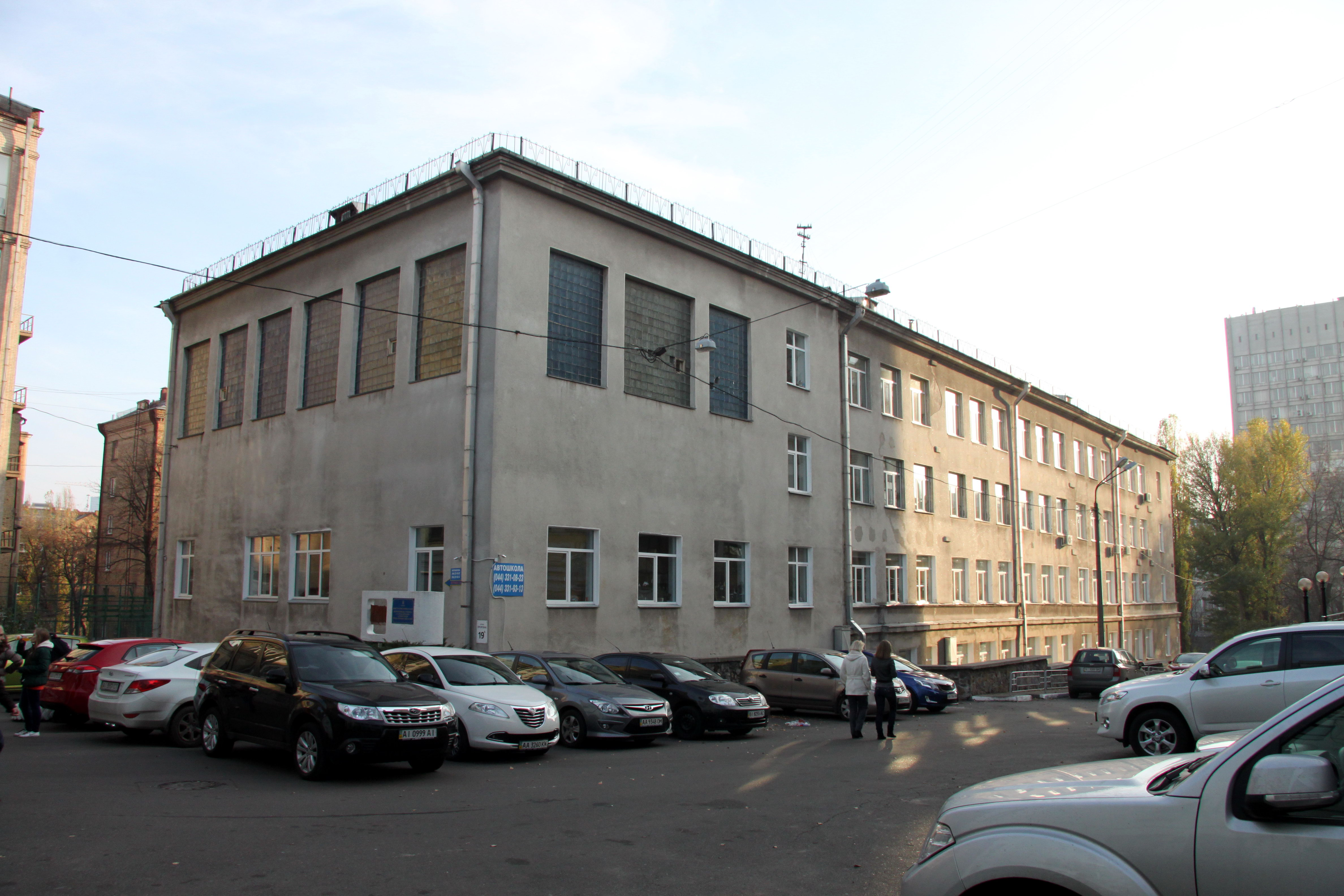 Будинок школи № 57, де вчилась у 1937–1940 рр. Гуля Корольова, героїня Великої Вітчізняної війни, Прорізна вул., 19-а, Київ